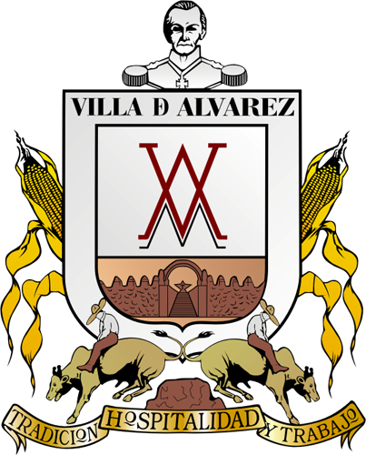 Escudo de Villa de Alvarez